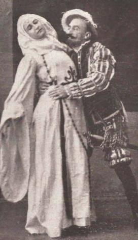 Jacinto Benavente y Consuelo Torres en una escena de la obra de teatro Don Juan Tenorio, de Zorrilla, representada en el Teatro de la Comedia de Madrid en 1911°